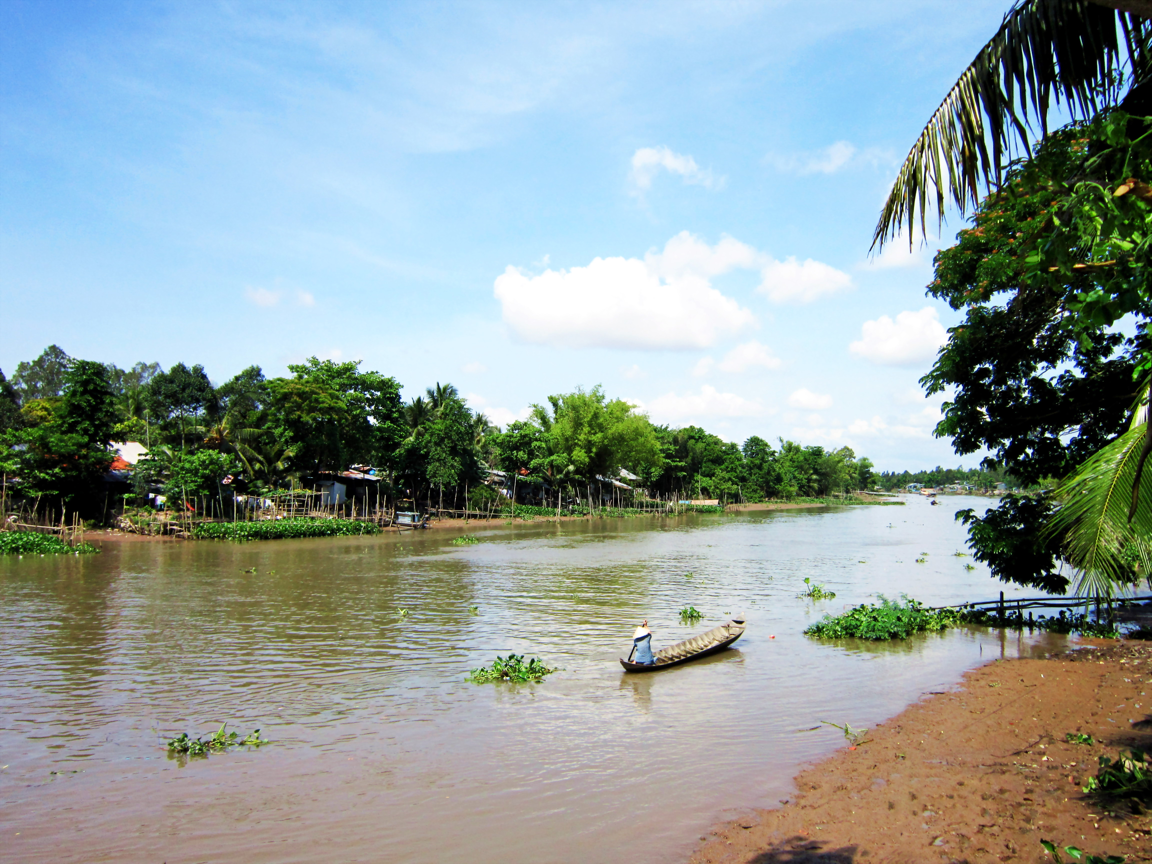 Sông (hay rạch) Long Xuyên, đoạn chảy qua xã Vĩnh Thành, huyện Châu Thành, An Giang, Việt Nam.